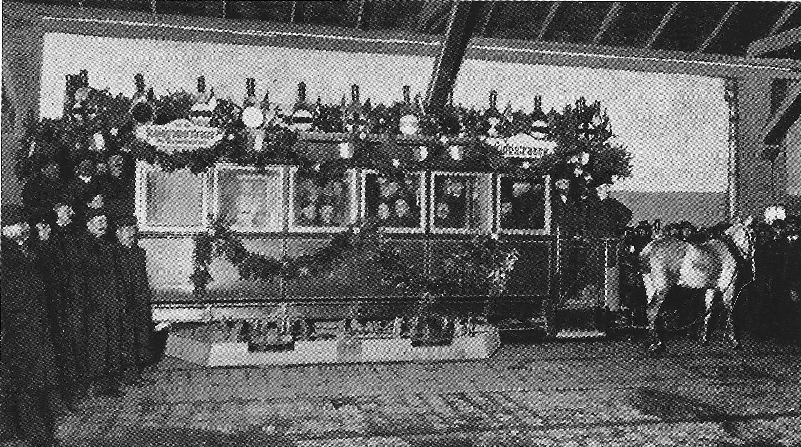 Letzte festlich geschmückte Pferdestraßenbahn der Wiener Tramwaygesellschaft